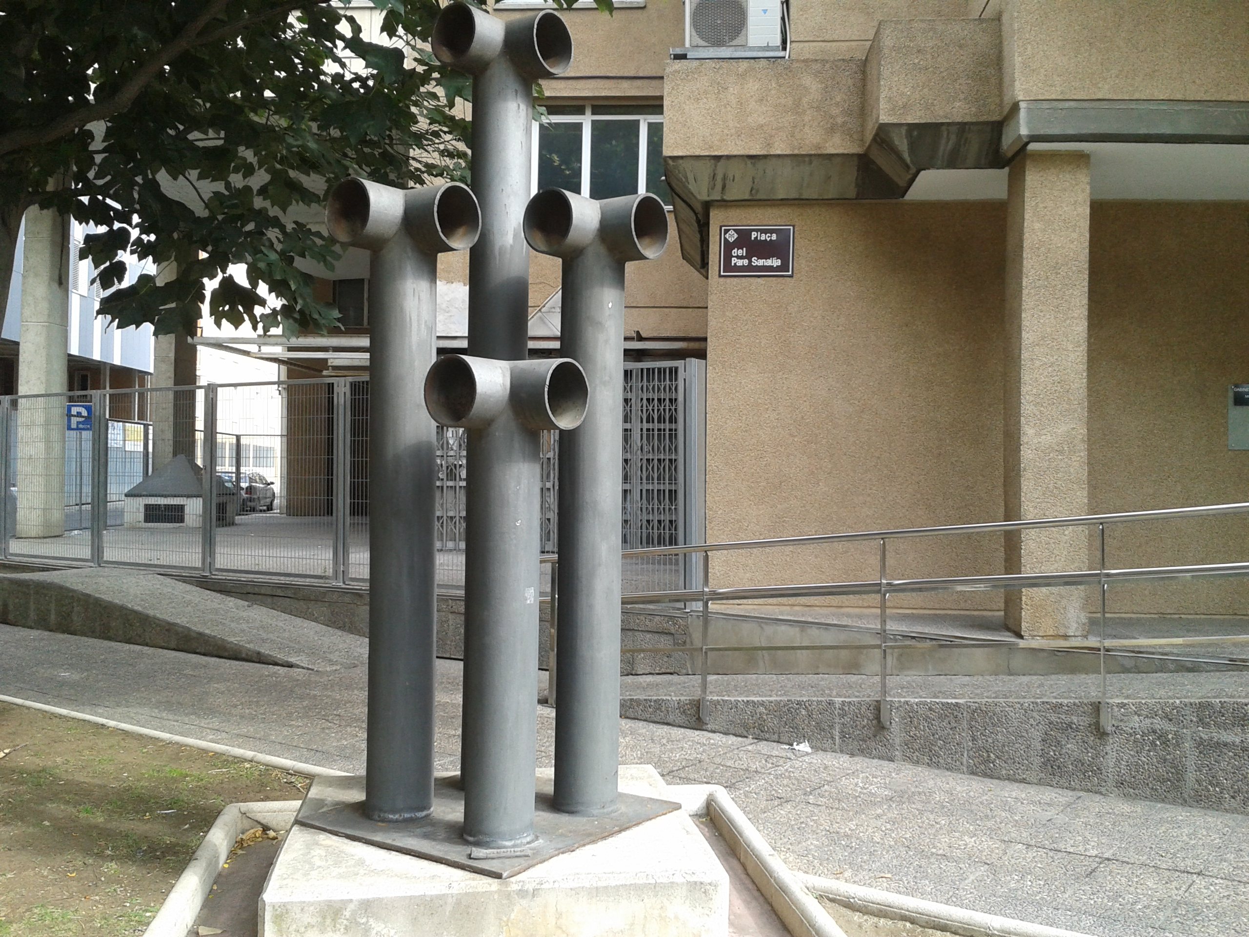 Estàtua en honor del riu Noguerola a la plaça del Pare Sanauja de Lleida